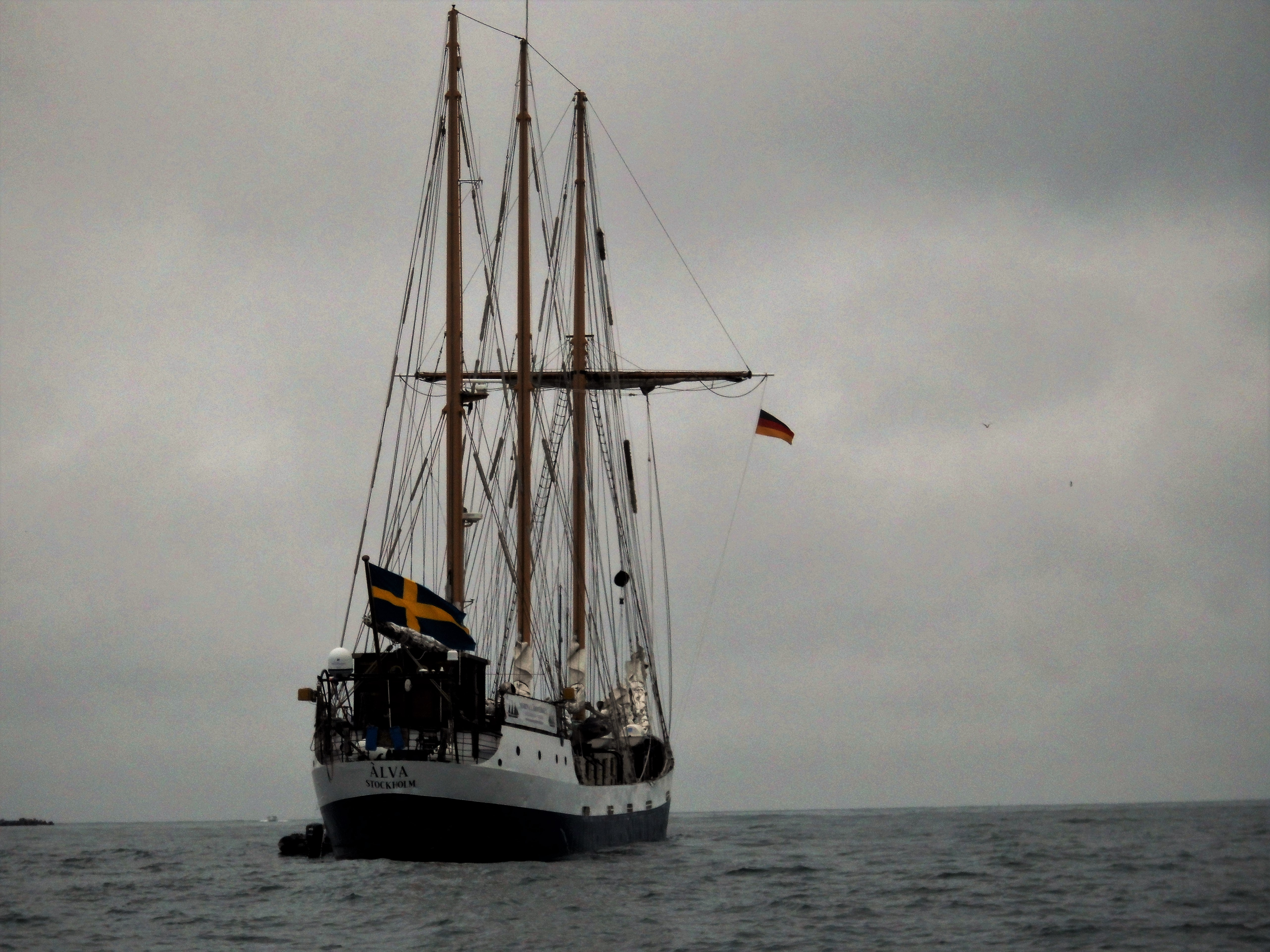 Der Dreimaster „Àlva“, Heimathafen Stockholm, auf der Reede vor der Insel Helgoland. Besitzer ist die schwedische Schule Marina läroverket.